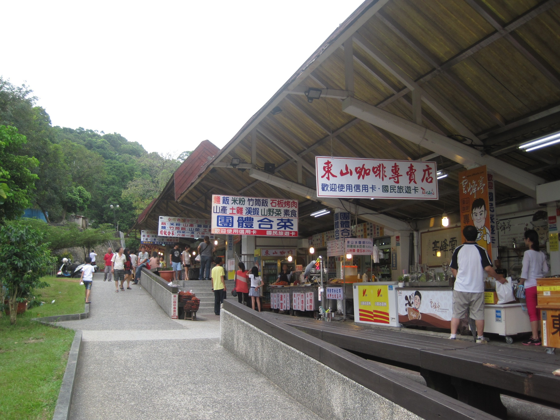 關子嶺水火同源附近的商店街。